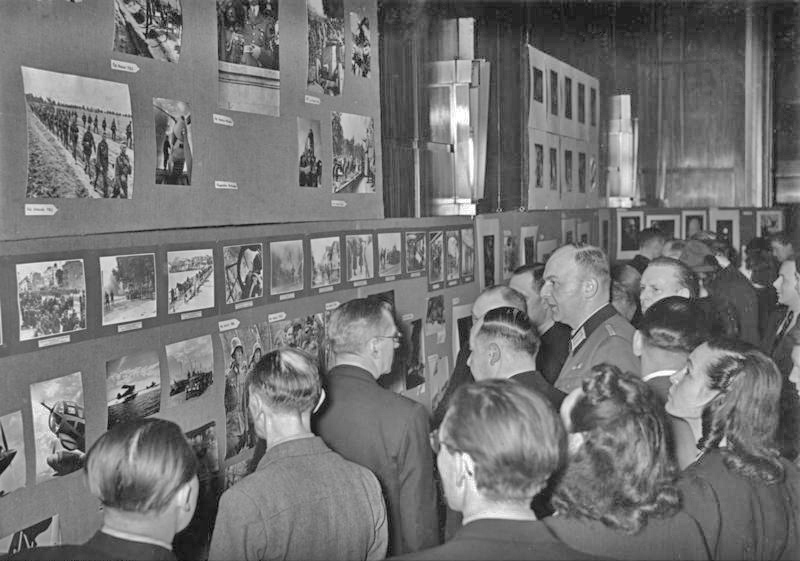 Berlin, Ausstellung von PK-Bildern Bildberichterstatter stellen aus Der Reichsausschuss der Bildberichterstatter im Reichsverband der Deutschen Presse veranstaltete im Rahmen eines Kulturabends eine Ausstellung von Spitzenleistungen seiner Mitglieder unter besonderer Berücksichtigung der Arbeiten der Angehörigen der Propaganda-Kompanie. UBz: Blick in die Ausstellung Fot. Eis. 16.3.40 ADN-TEXT ADN-ZB/Archiv II. Weltkrieg 1939-45, Faschistisches Deutschland: Berlin Der faschistische Reichsausschuss der Bildberichterstatter im Reichsverband der Deutschen Presse veranstaltete Mitte März 1940 im Rahmen eines Kulturabends eine Ausstellung von Spitzenleistungen seiner Mitglieder unter besonderer Brücksichtigung der Arbeit der Angehörigen der Propaganda-Kompanie der faschistischen deutschen Wehrmacht.- Blick in die Ausstellung. (Mitte in Wehrmachtsuniform) der Leiter des Referats "Bildpresse" im faschistischen Propagandaminsteriums, Heiner Kurzbein. Aufnahme: Eisenhart [Berlin.- Besucher (Mitte: Heiner Kurzbein) einer Ausstellung von Fotos von Bildberichtern der Propagandakompanien aus dem Polenfeldzug] Abgebildete Personen: Kurzbein, Heiner: Regierungsrat im Propagandaministerium, Deutschland